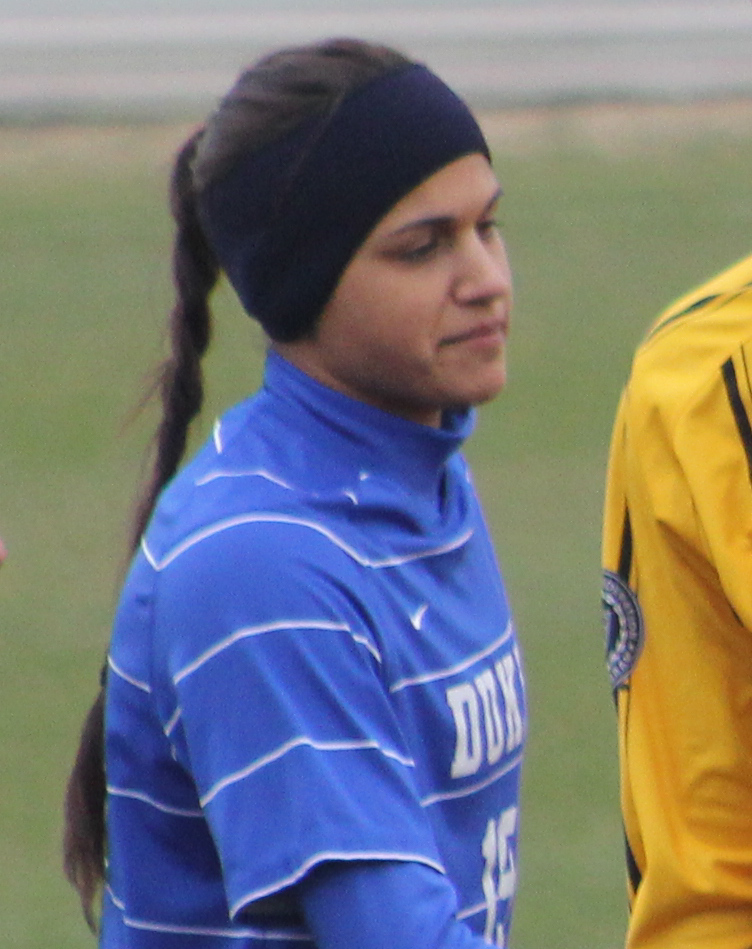 Kim DeCesare (Duke Blue Devils)